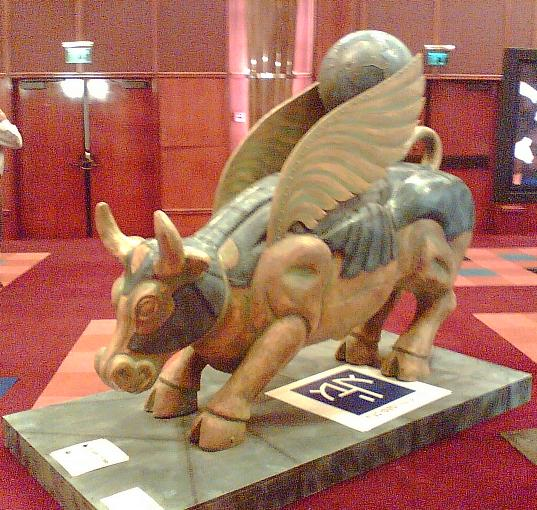 שור מתוך המיצב של הבורסה לניירות ערך בתל אביב. צילם דוד שי.